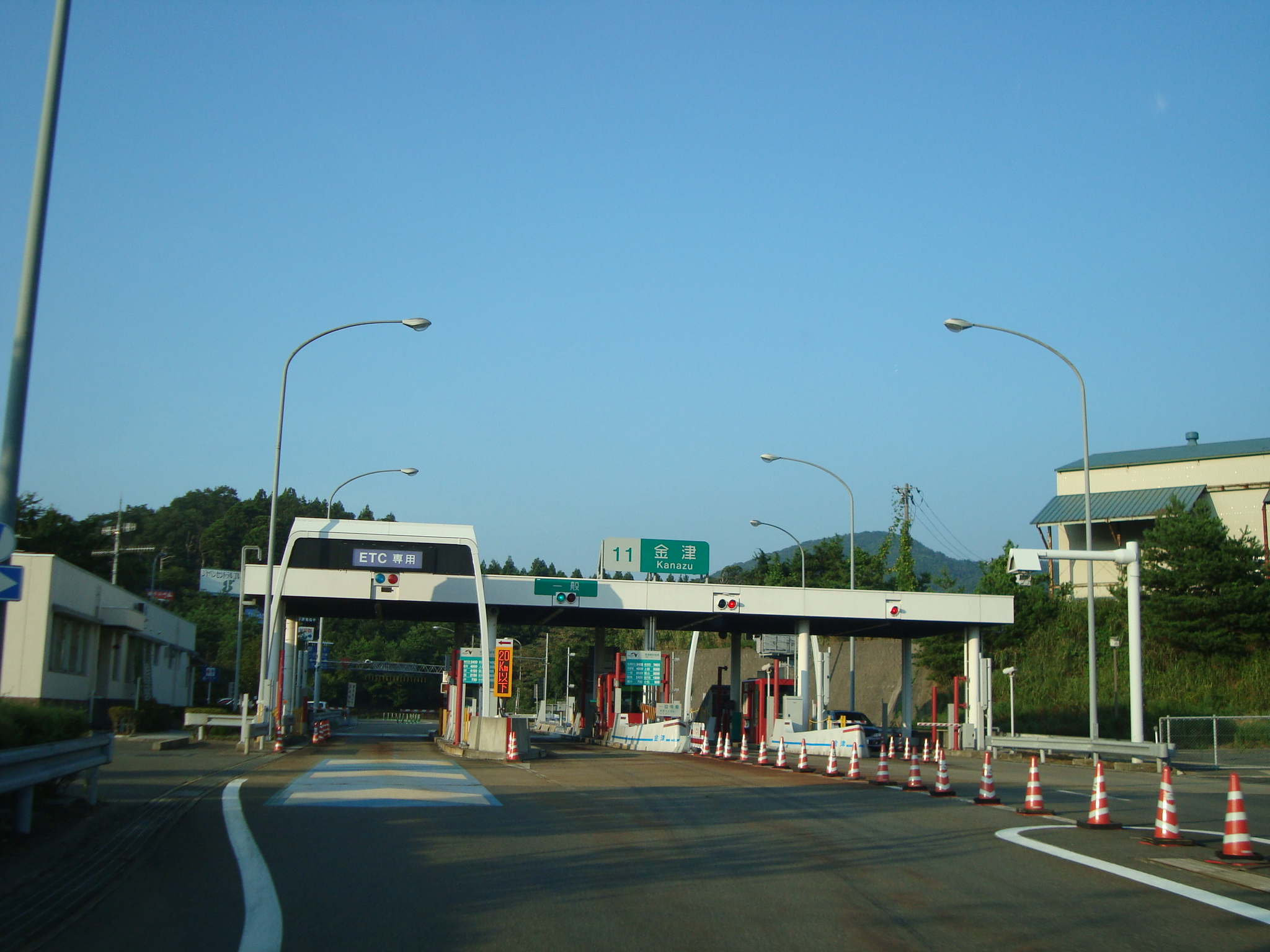 北陸自動車道 金津インターチェンジ料金所 福井県あわら市